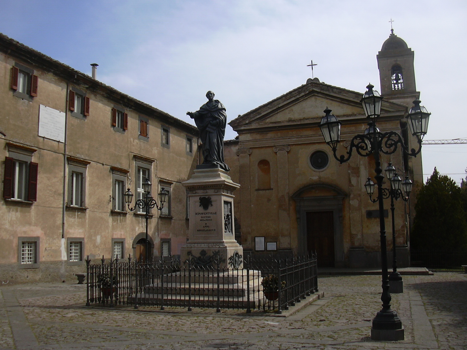 Bagnoregio, Piazza Sant'Agostino con la Chiesa dell'Annunziata